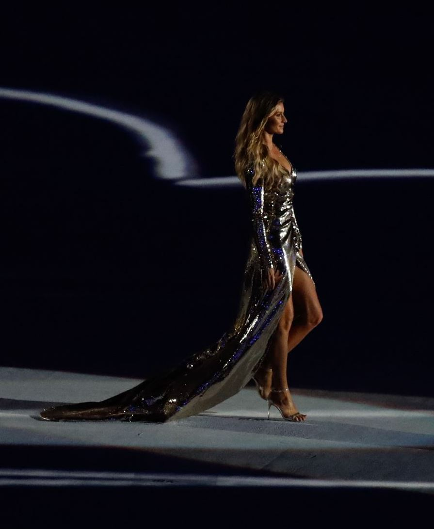 Rio de Janeiro - Cerimônia de abertura dos Jogos Olímpicos Rio 2016 no Estádio do Maracanã. (Fernando Frazão/Agência Brasil)